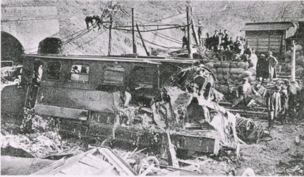 1918年3月7日、11両編成の貨物列車が電気機関車の故障で碓氷峠を逆走、熊ノ平駅で詰所を破壊し岩壁に衝突、車掌ら3人が死亡。10000形10004(後のEC40形)が見える。